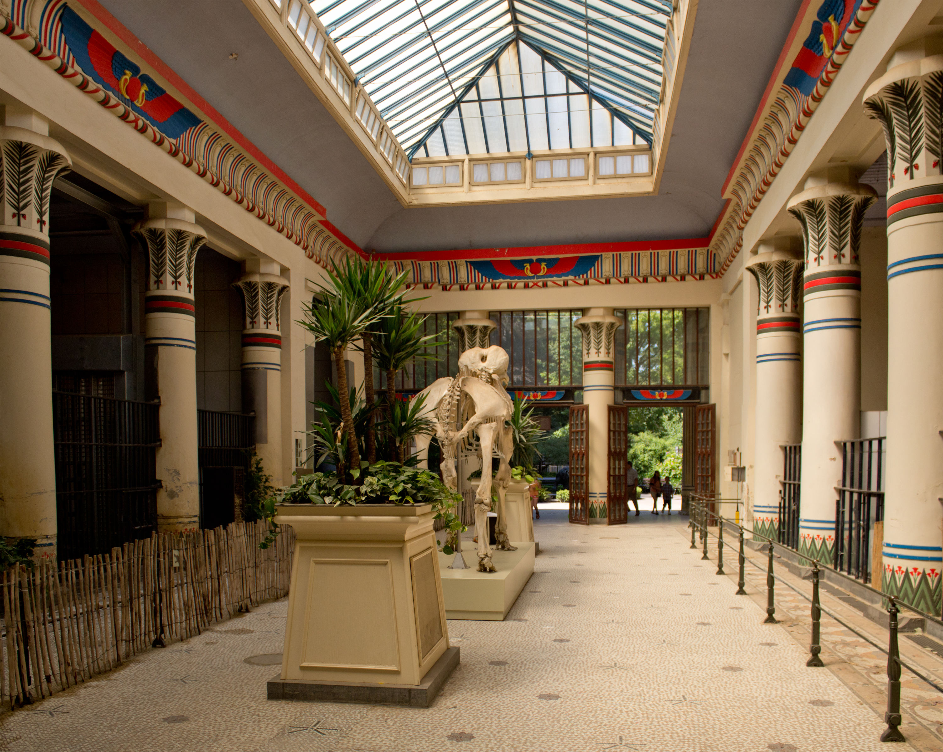 Dierentuin van antwerpen. Egyptische tempel voor grote Afrikaanse diersoorten.